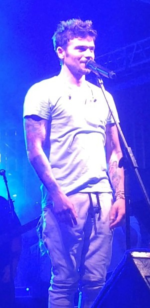 Pedro Capó dando unconcierto